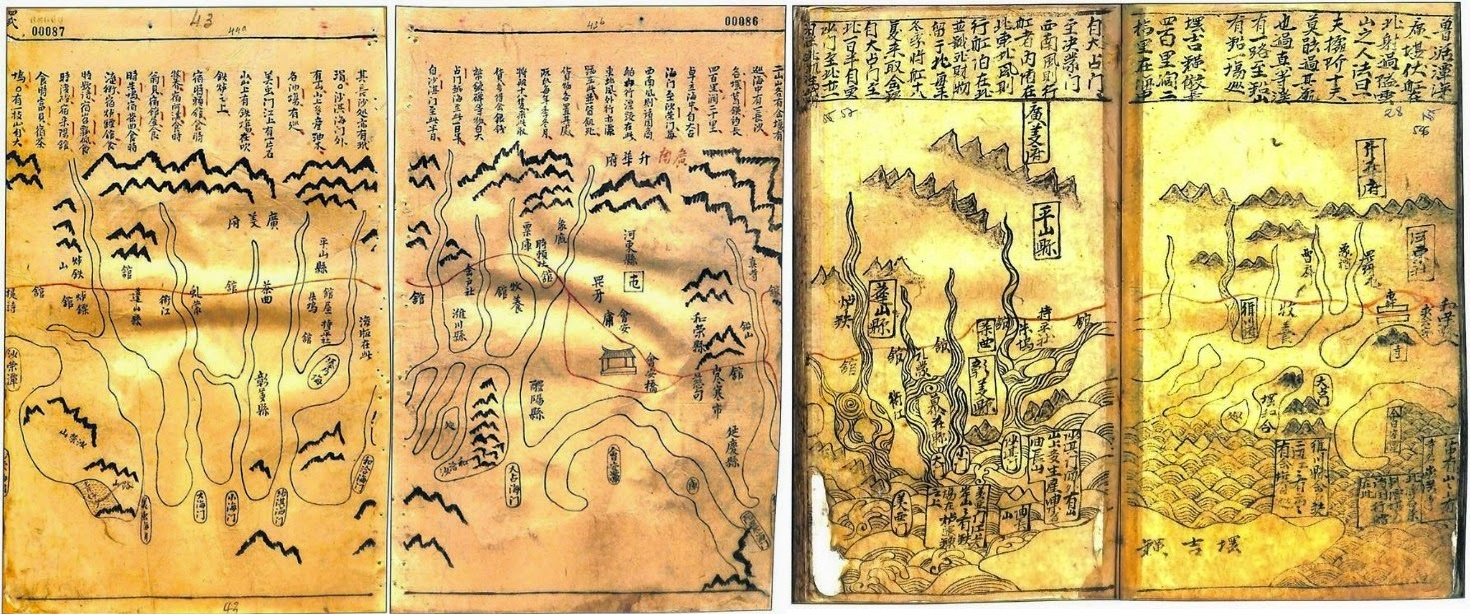 Đây là bản đồ vùng Quảng Ngãi và quần đảo Hoàng Sa, trong tập bản đồ Thiên Nam tứ chí lộ đồ thư do Đỗ Bá biên soạn vào giữa thế kỷ XVII.